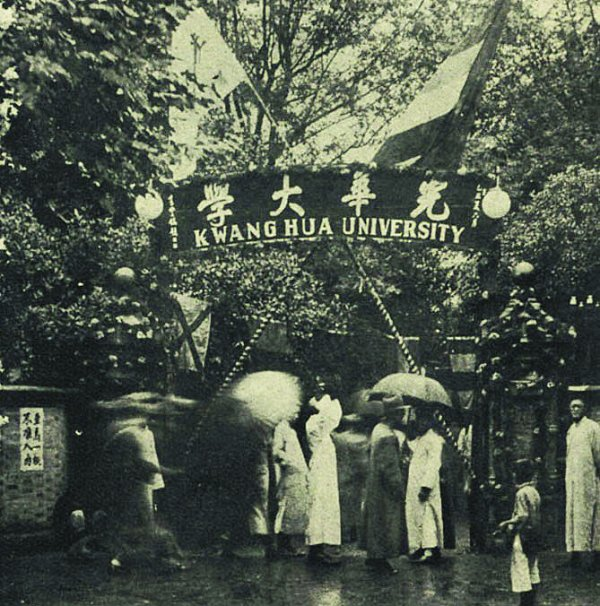 中文（香港）: 光華大學第一次開學典禮